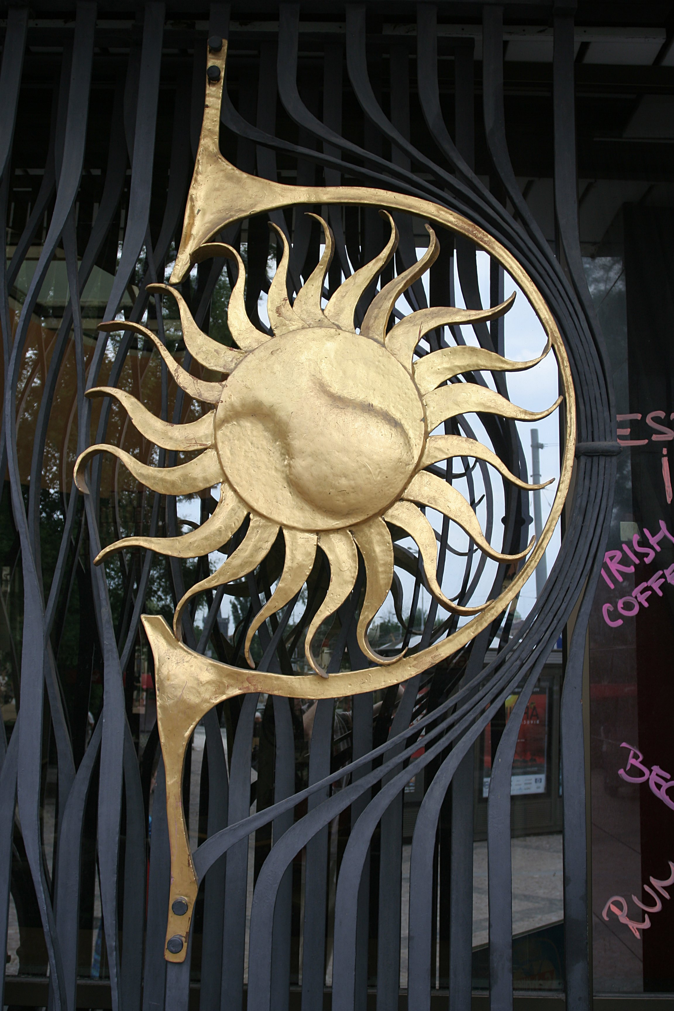 detail kované mříže, Praha, Malostranská